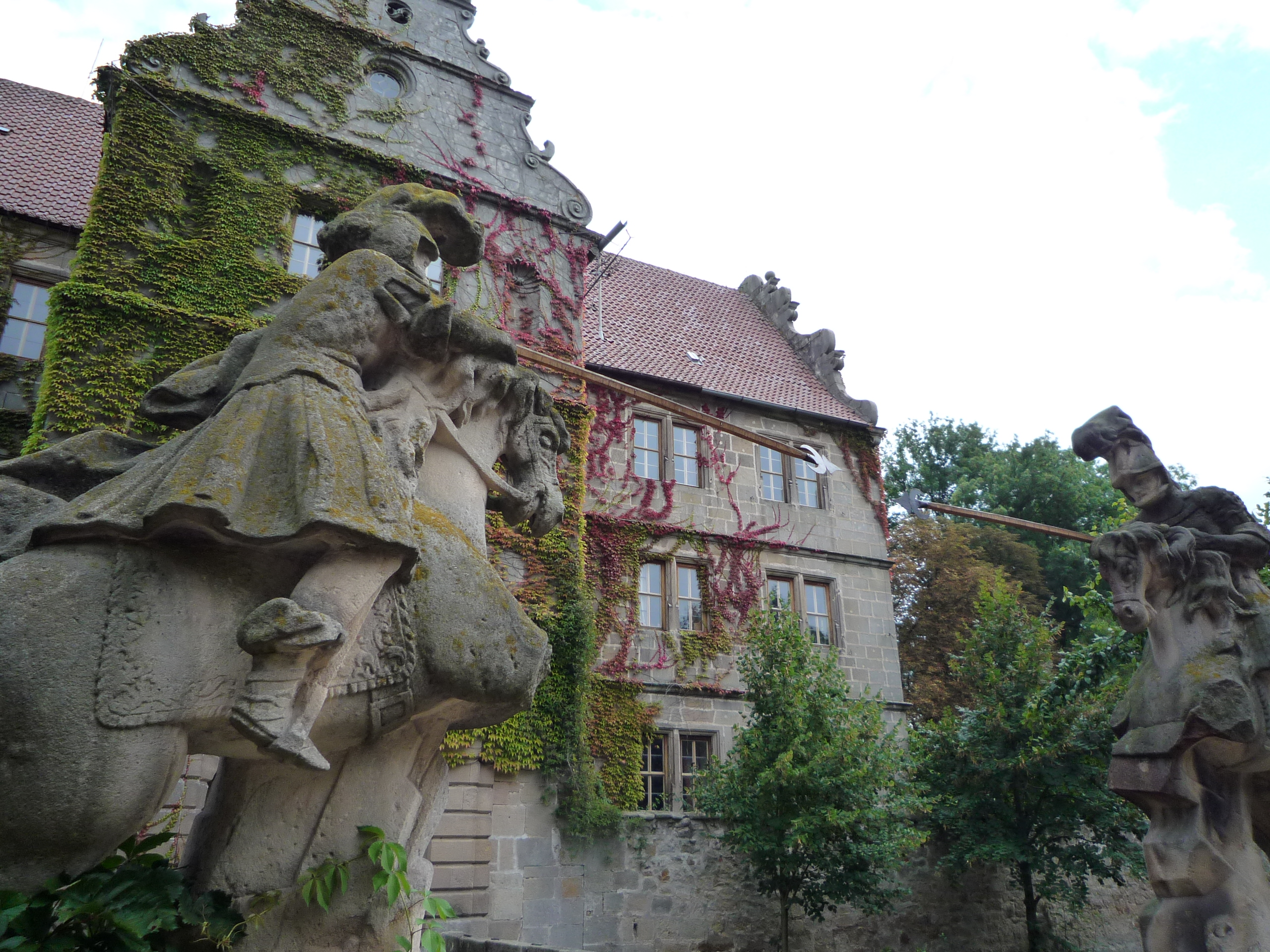 Turnierritter vor dem Schloß Friesenhausen